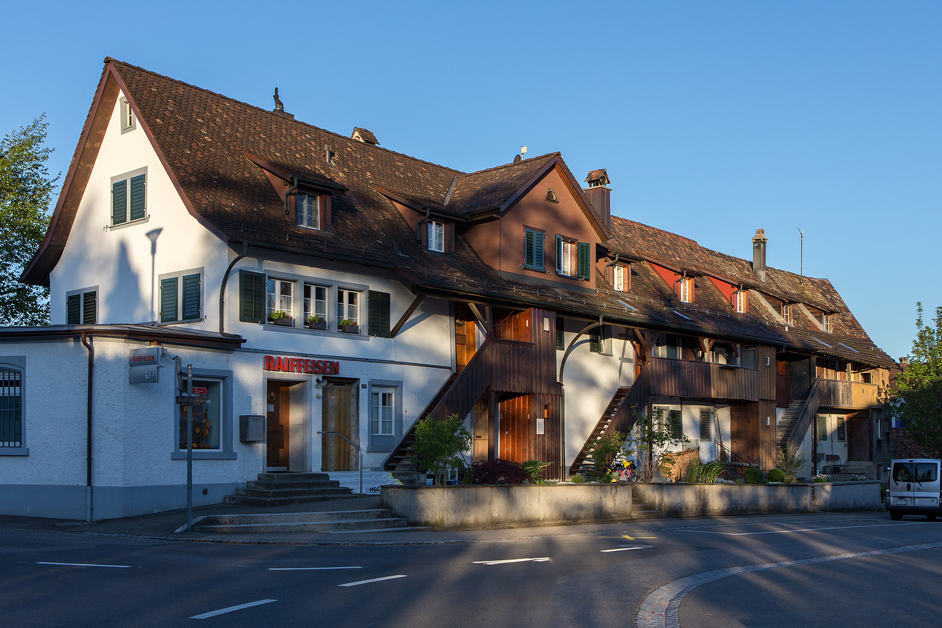 Arbeiterreihenhäuser Langbau an der Dorfstrasse in Hauptwil (TG)